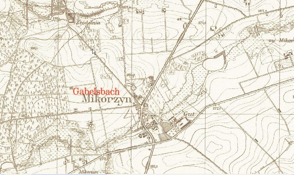 Mapa Mikorzyna i okolic z roku 1940.